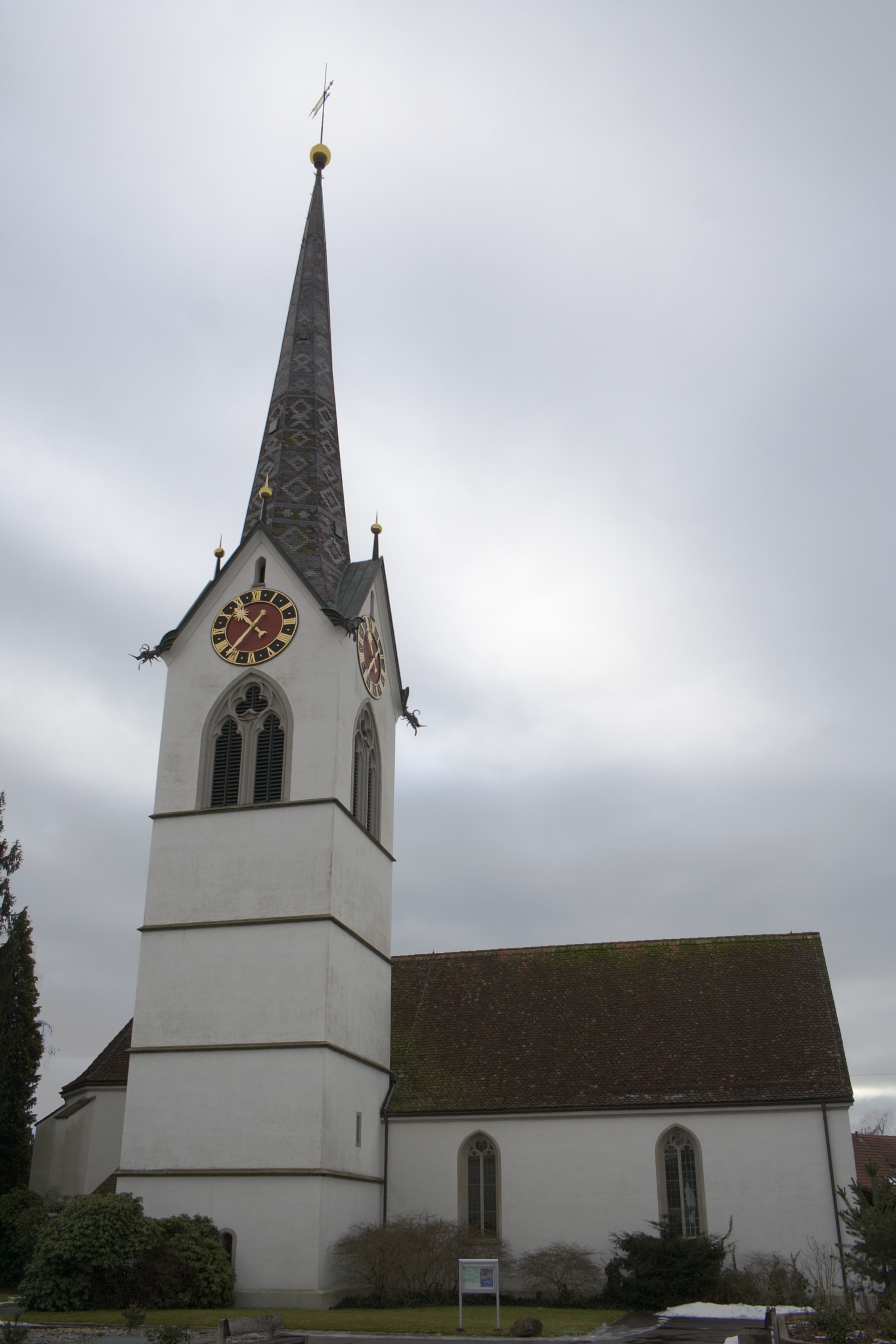 Reformierte Kirche Mettmenstetten, Schweiz